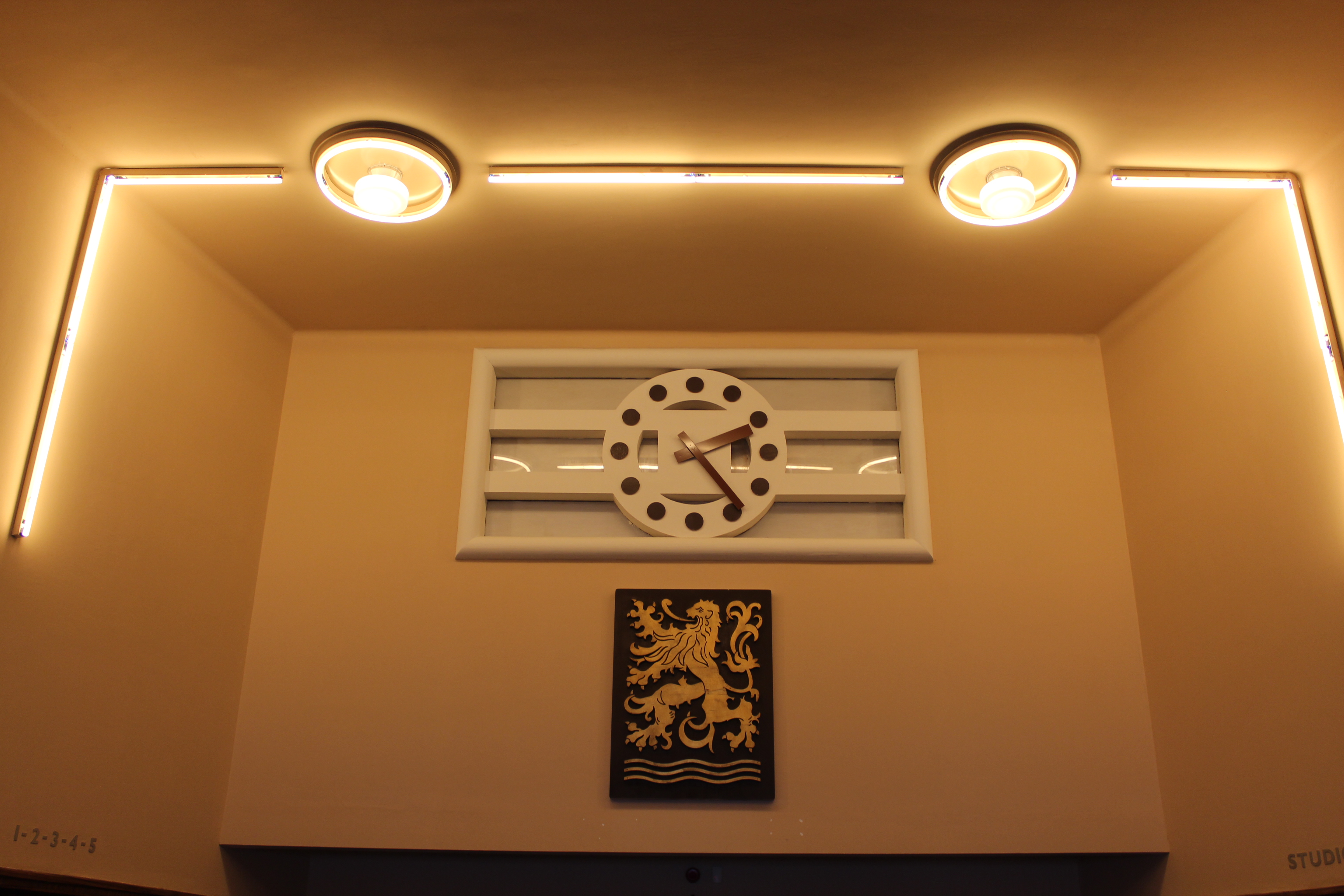 Interior of Flagey building, former Institut national de Radiodiffusion belge. Architect: Joseph Diongre, built in 1938.